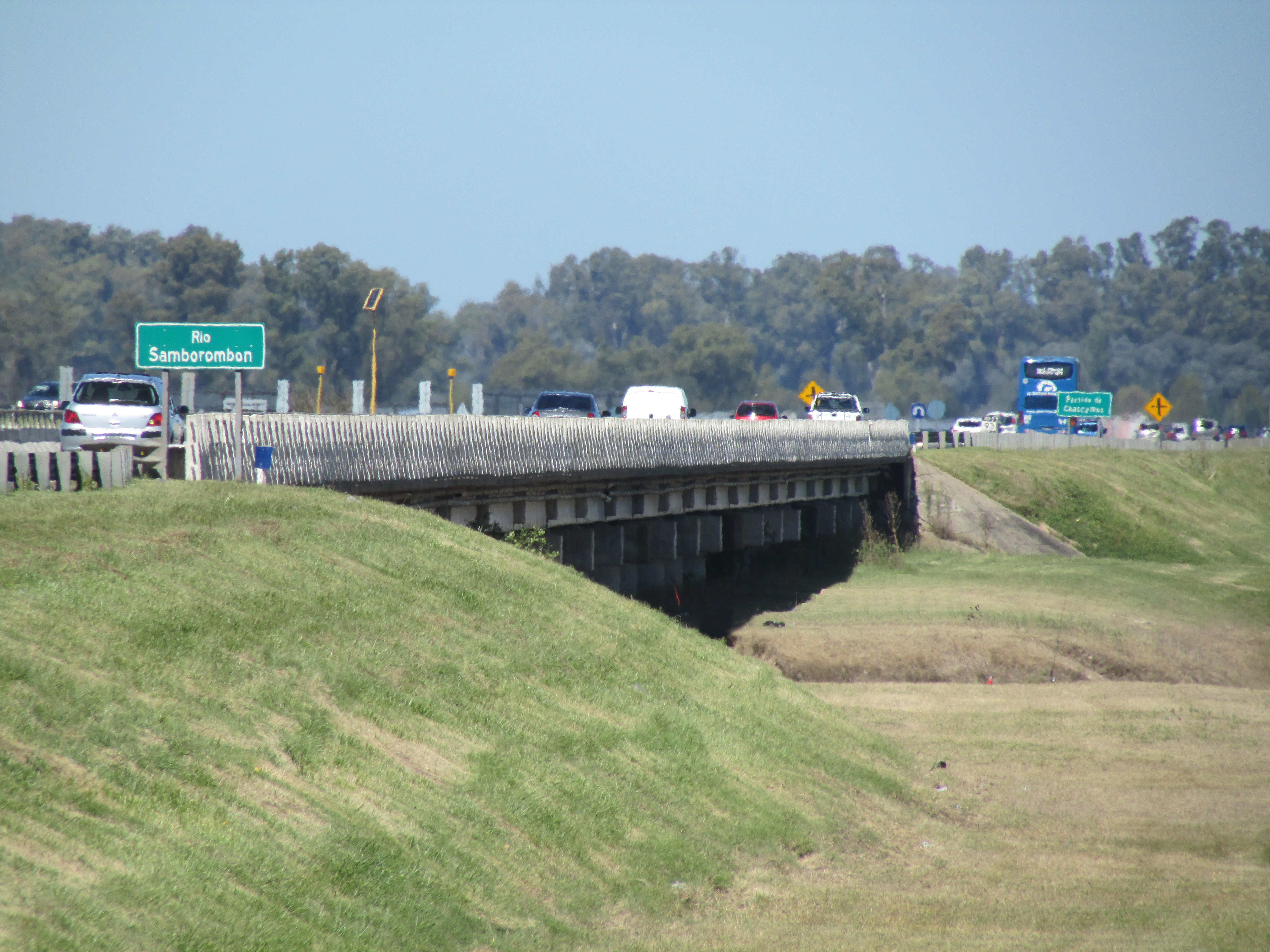 Puente de la Autovía 2 en sentido sur sobre el río Samborombón, límite natural entre el partido de Brandsen y Chascomús, provincia de Buenos Aires, Argentina.